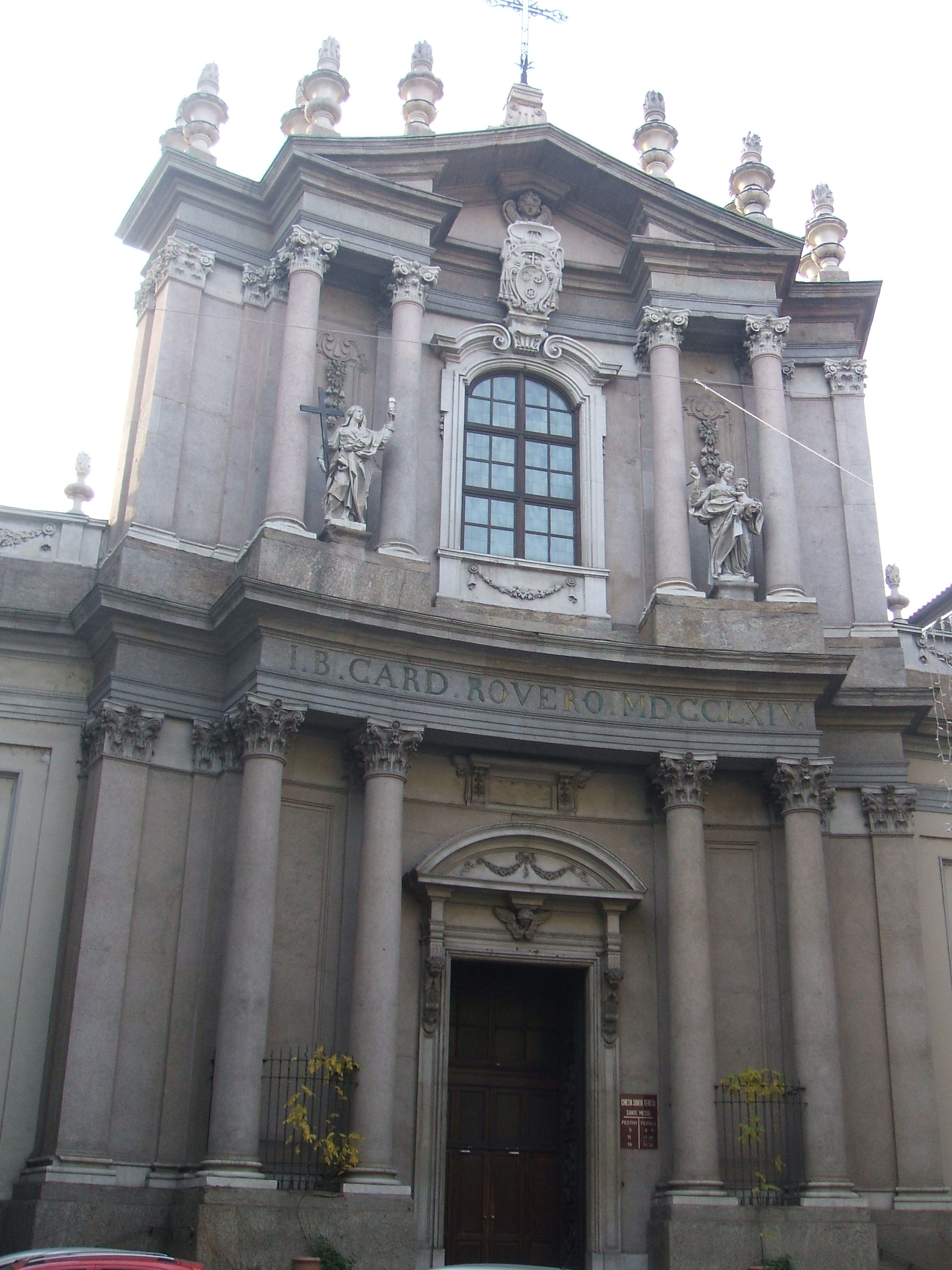 La chiesa di Santa Teresa a TorinoPiemontèis: La cesa 'd Santa Teresa a Turin